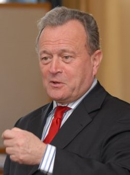 Christian Vanneste Député UMP du Nord Vice-Président du CNI